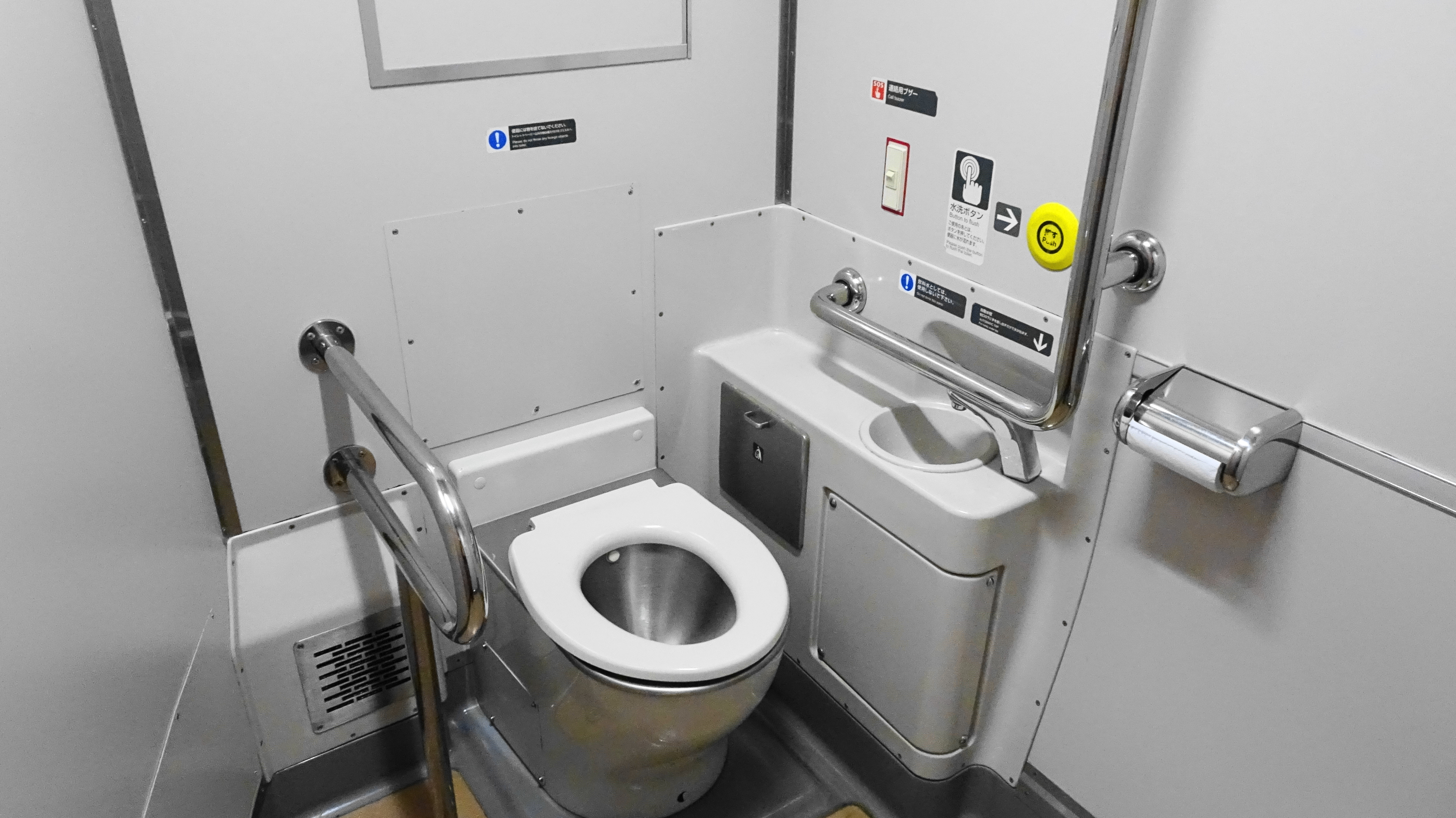 JR東日本E531系電車のトイレです。2019年3月23日撮影。